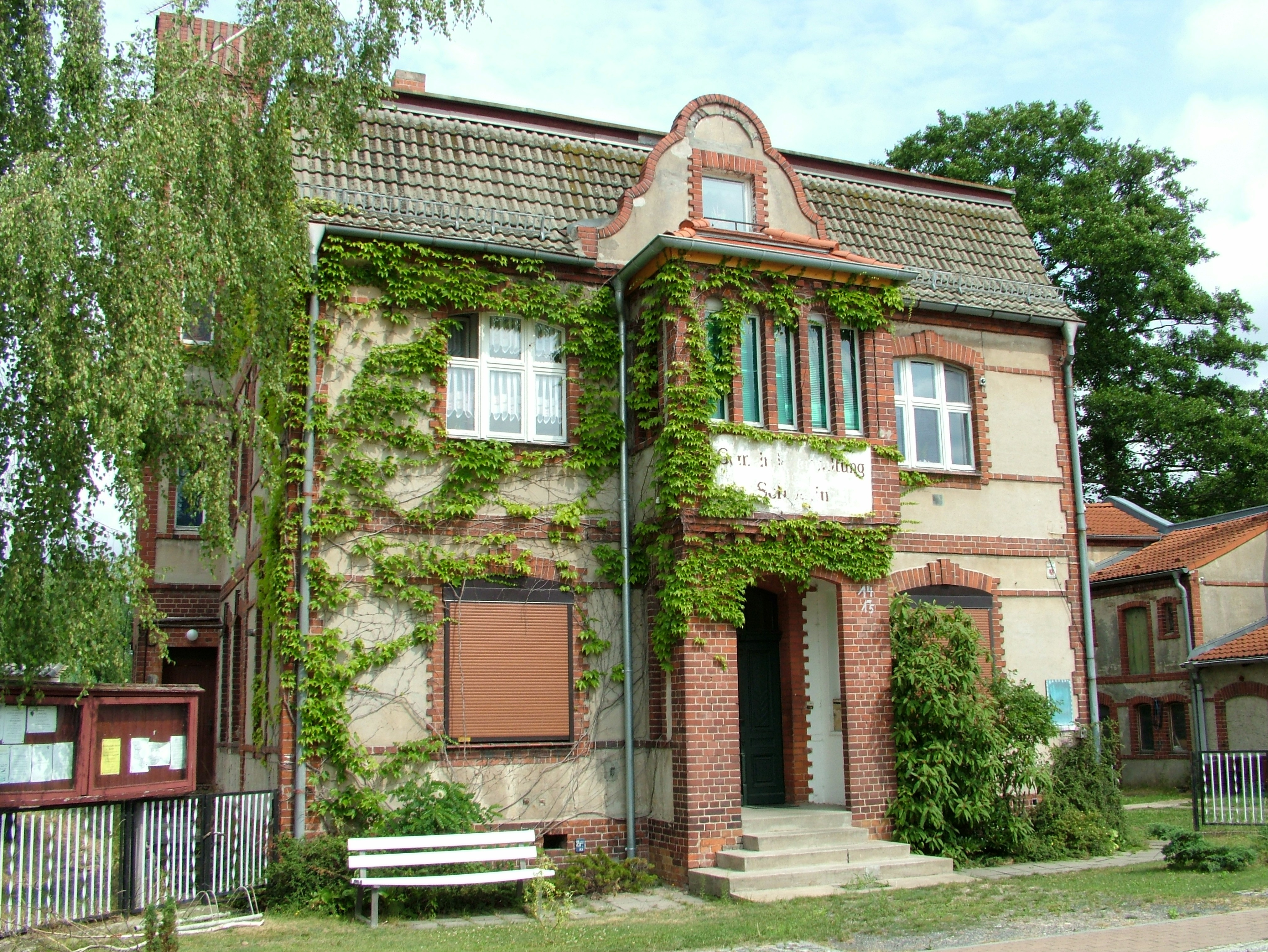 Schwerin (bei Königs Wusterhausen), Brandenburg, die ehemalige Gemeindeverwaltung